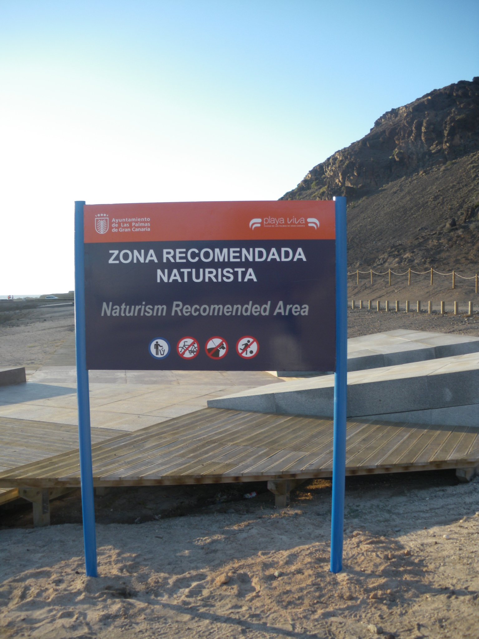 "Zona recomendada naturista" El ayuntamiento de Las Palmas recuerda a los usuarios con la señalización que El Confital es una lugar ideal para hacer naturismo-nudismo.